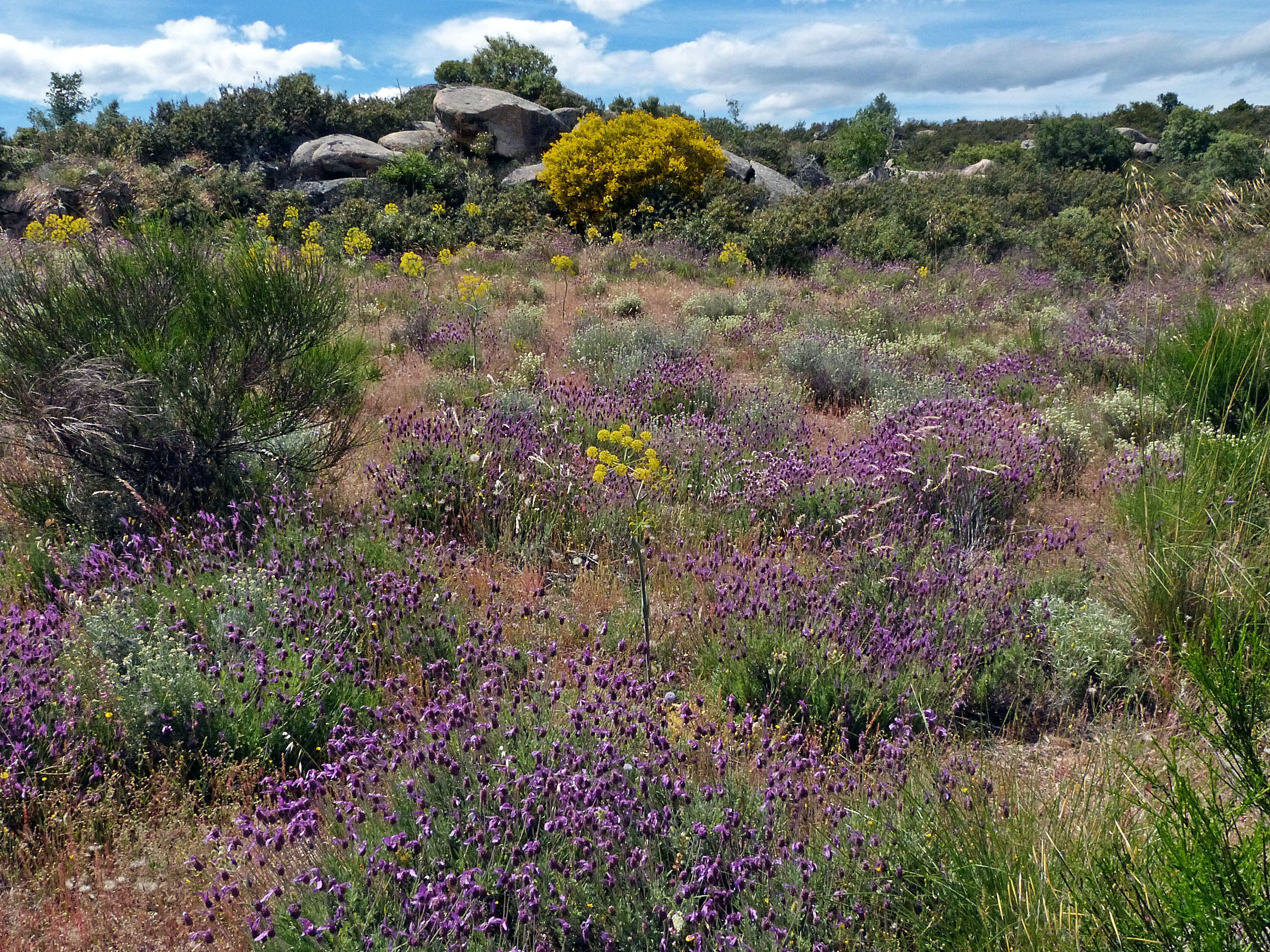 Umland von El Berrueco